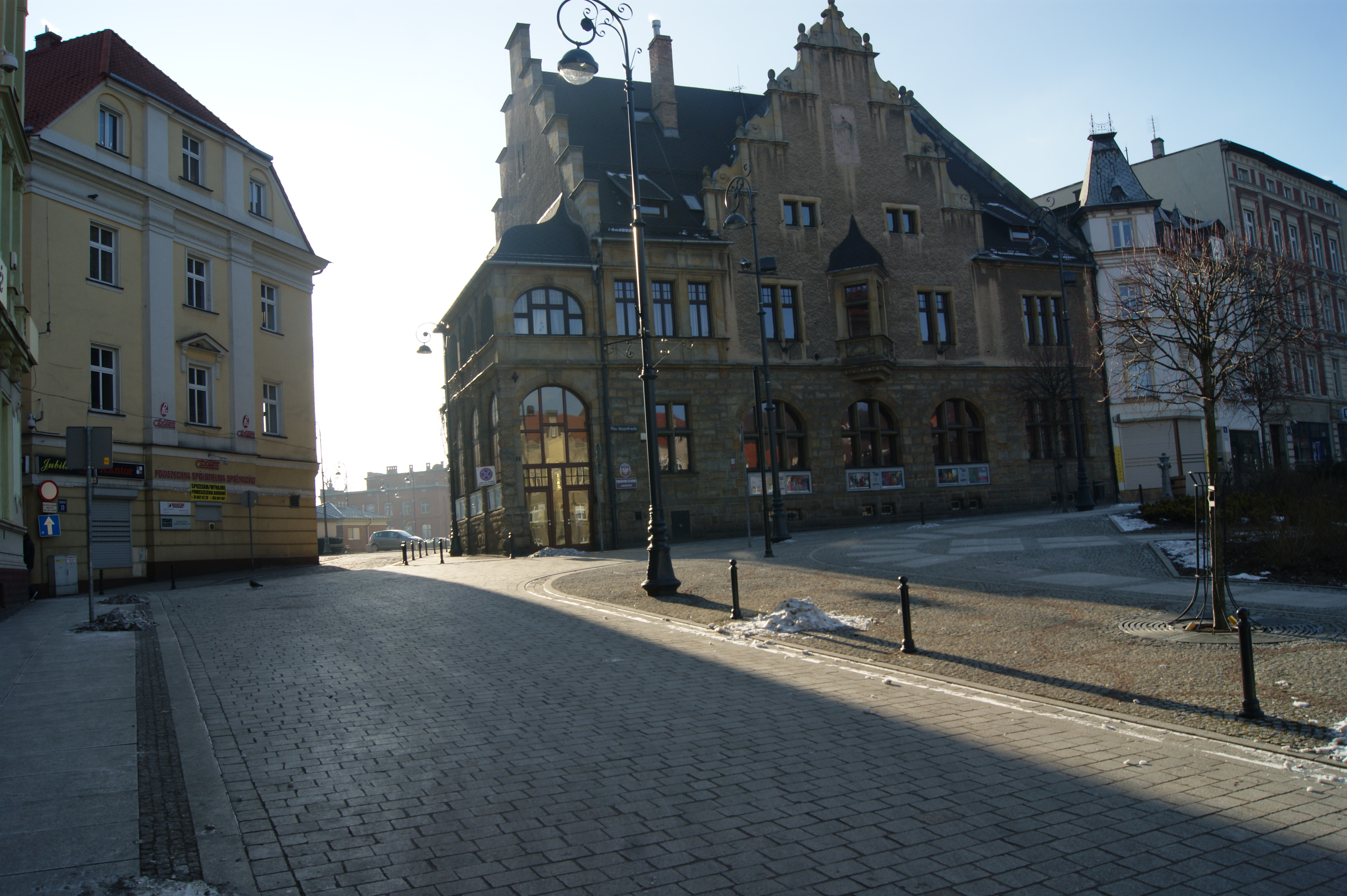 Prokuratura w Wałbrzychu